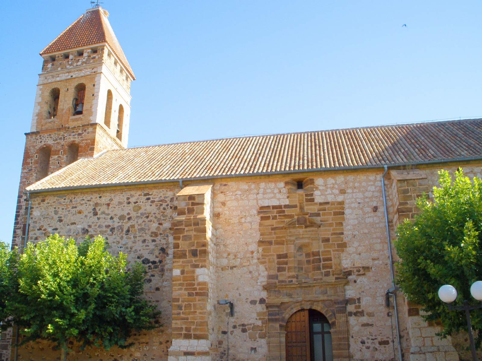 Iglesia de la Visitación de Nuestra Señora (Argamasilla de Calatrava, Ciudad Real)